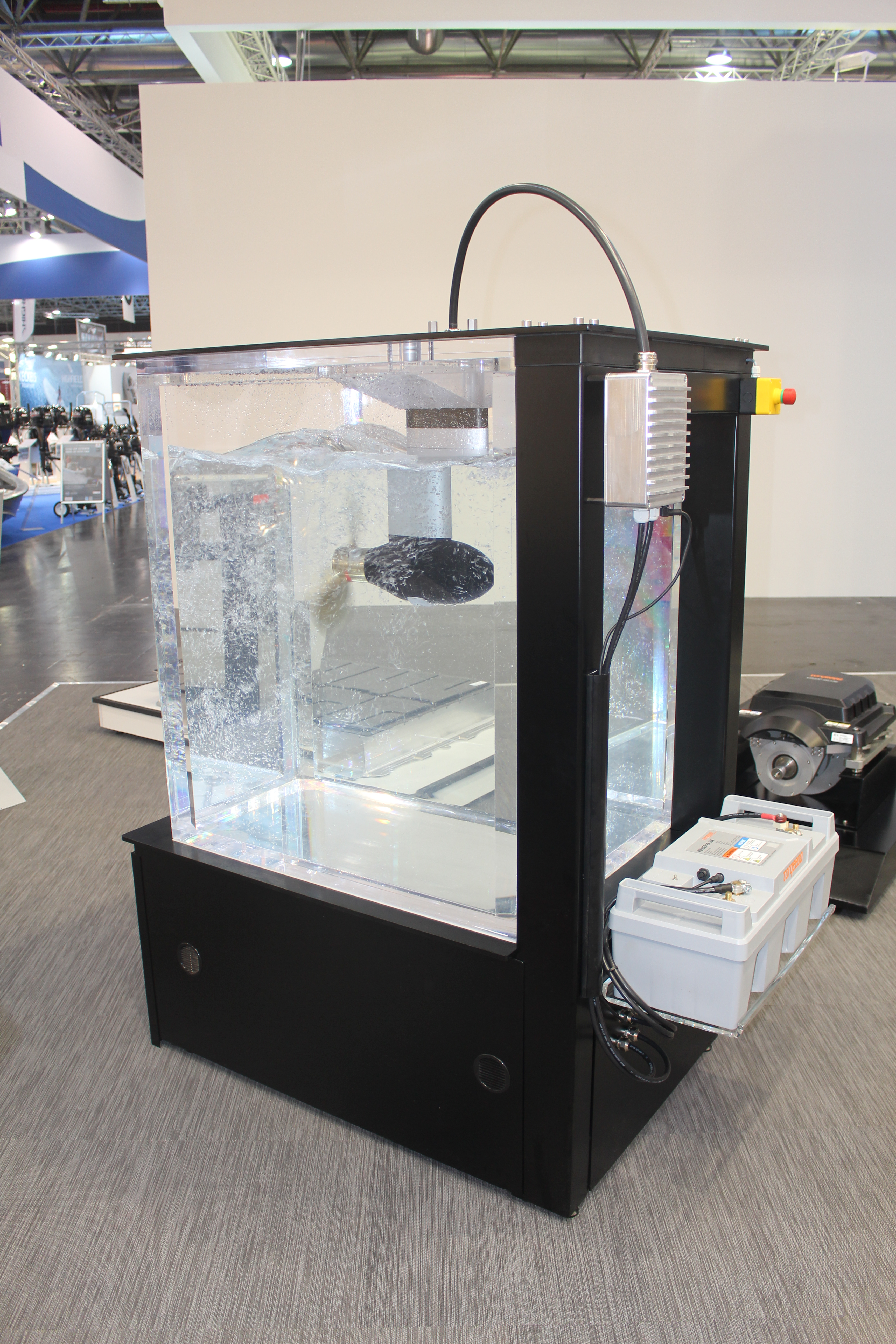 Elektrischer Bootsmotor, CRUISE FP Pod für Segelboote, 8 PS Äquivalent